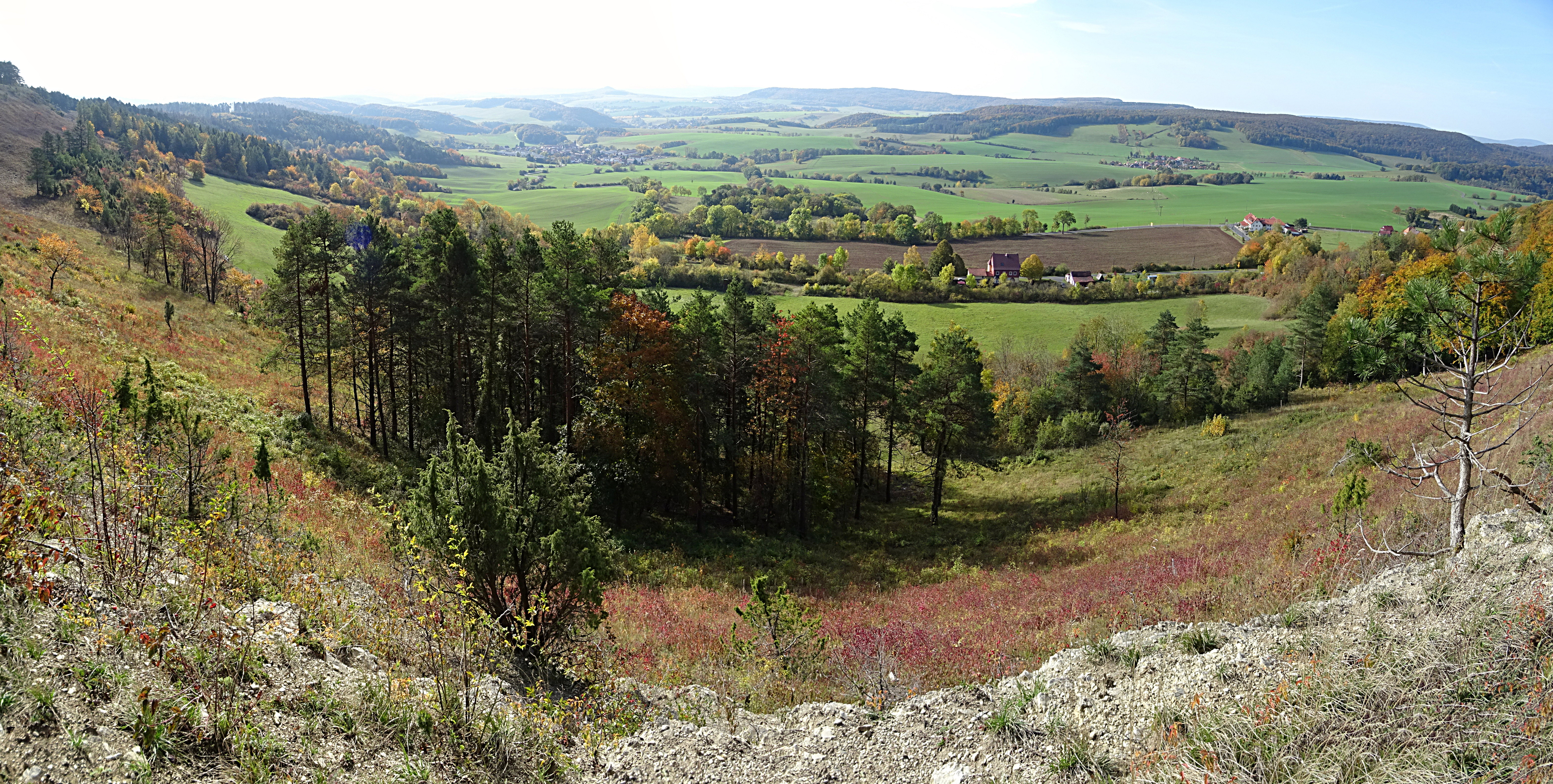 Ausblick von den Dieteröder Klippen nach Süden